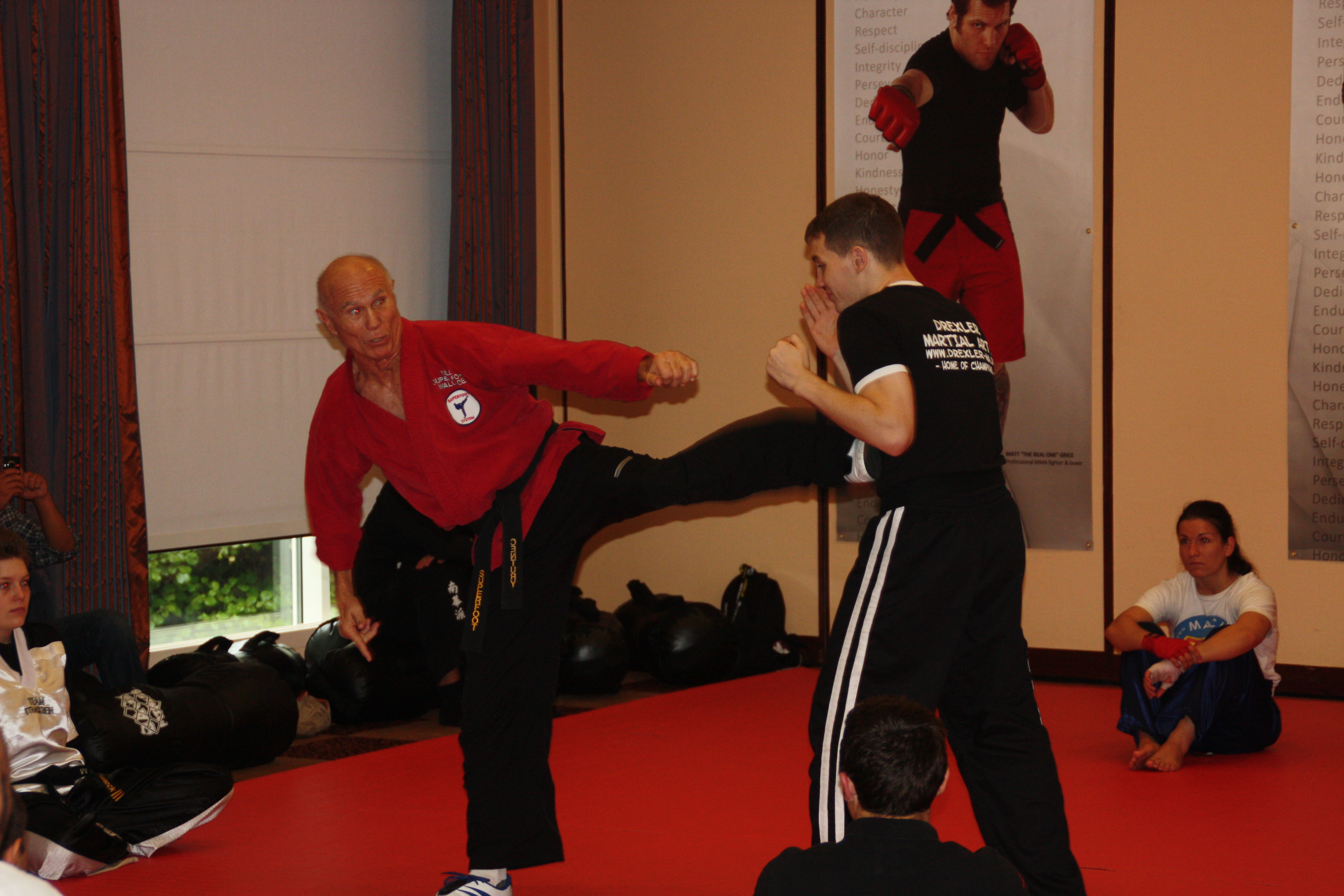 Bill Superfoot Wallace in Action